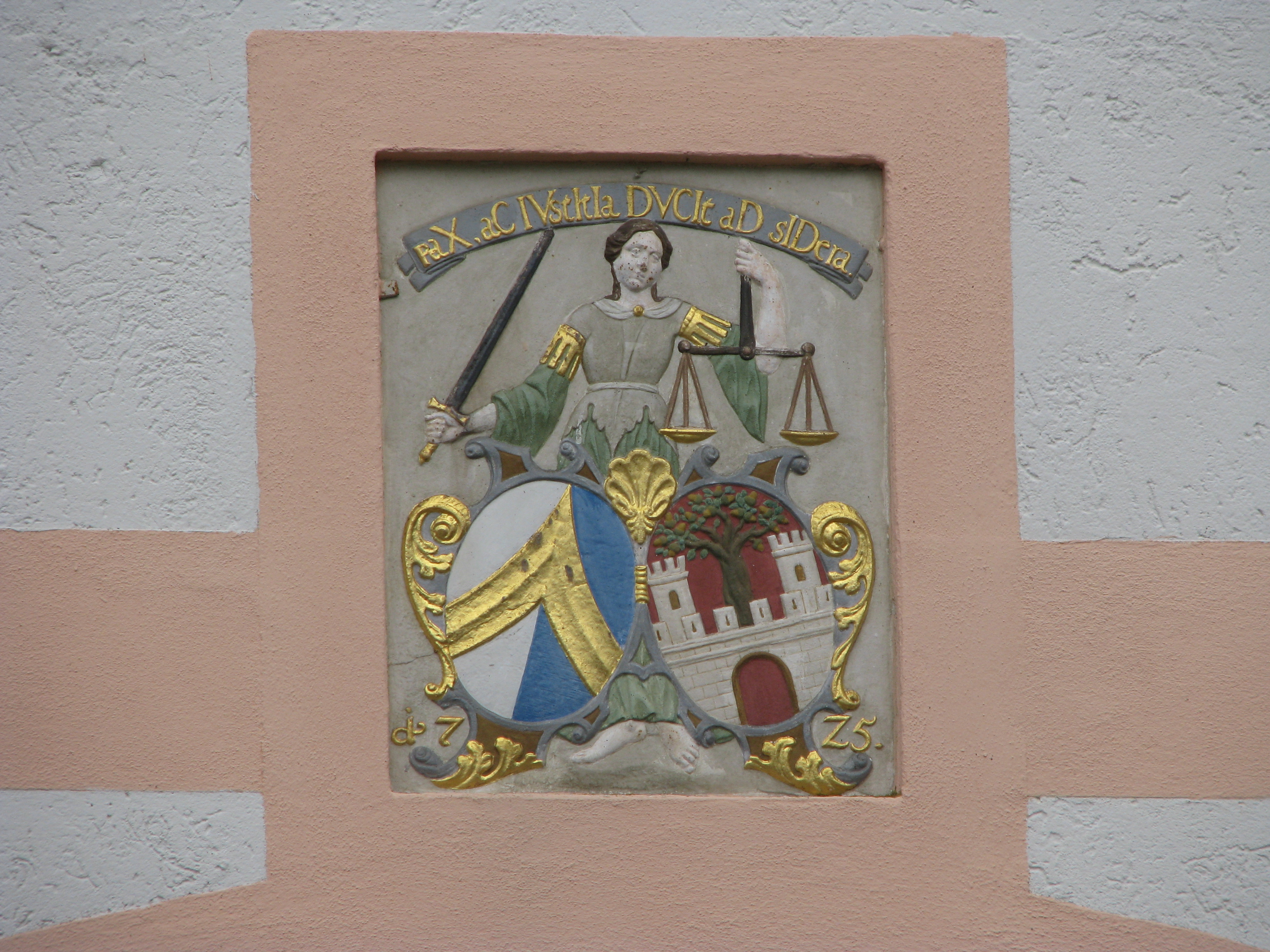 Ziegelhof bei Eichstätt, Hauptgebäude mit Wappen, Inschrift und Chronogramm "1725"